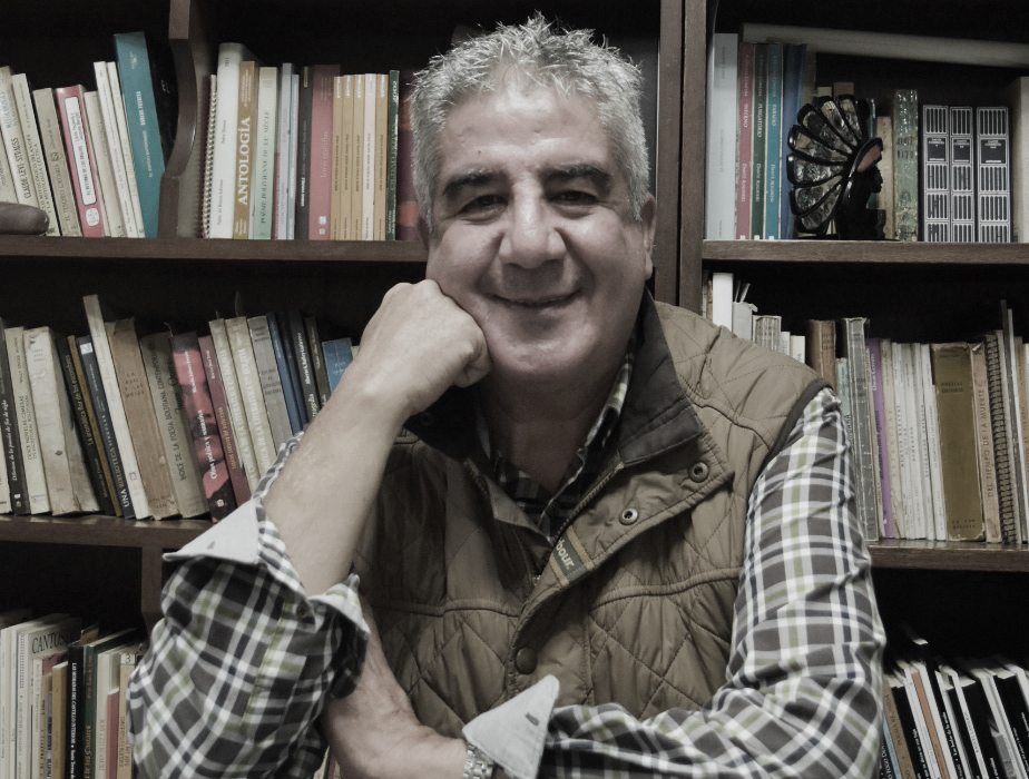 Fotografía tomada en la biblioteca de Gary Daher en Santa Cruz de la Sierra, Bolivia.